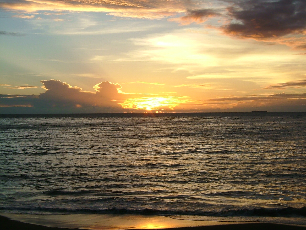 Yellow Sunset at Padang beach (Tapi Lauik), West Sumatra, Indonesia